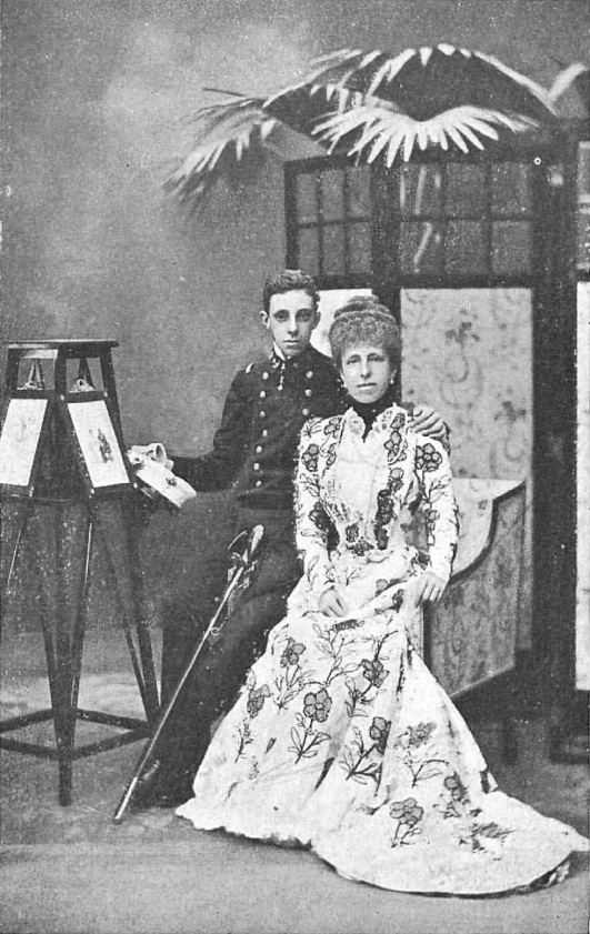 Último retrato de SS.MM, la reina regente y el rey D. Alfonso XIII. Fotografía de Christian Franzen.